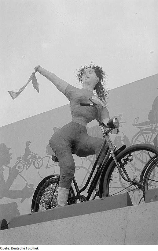 Original image description from the Deutsche Fotothek Dekorationsfigur einer fahrradfahrenden Frau auf einem Rad des VEB MIFA Fahrradwerke Sangerhausen